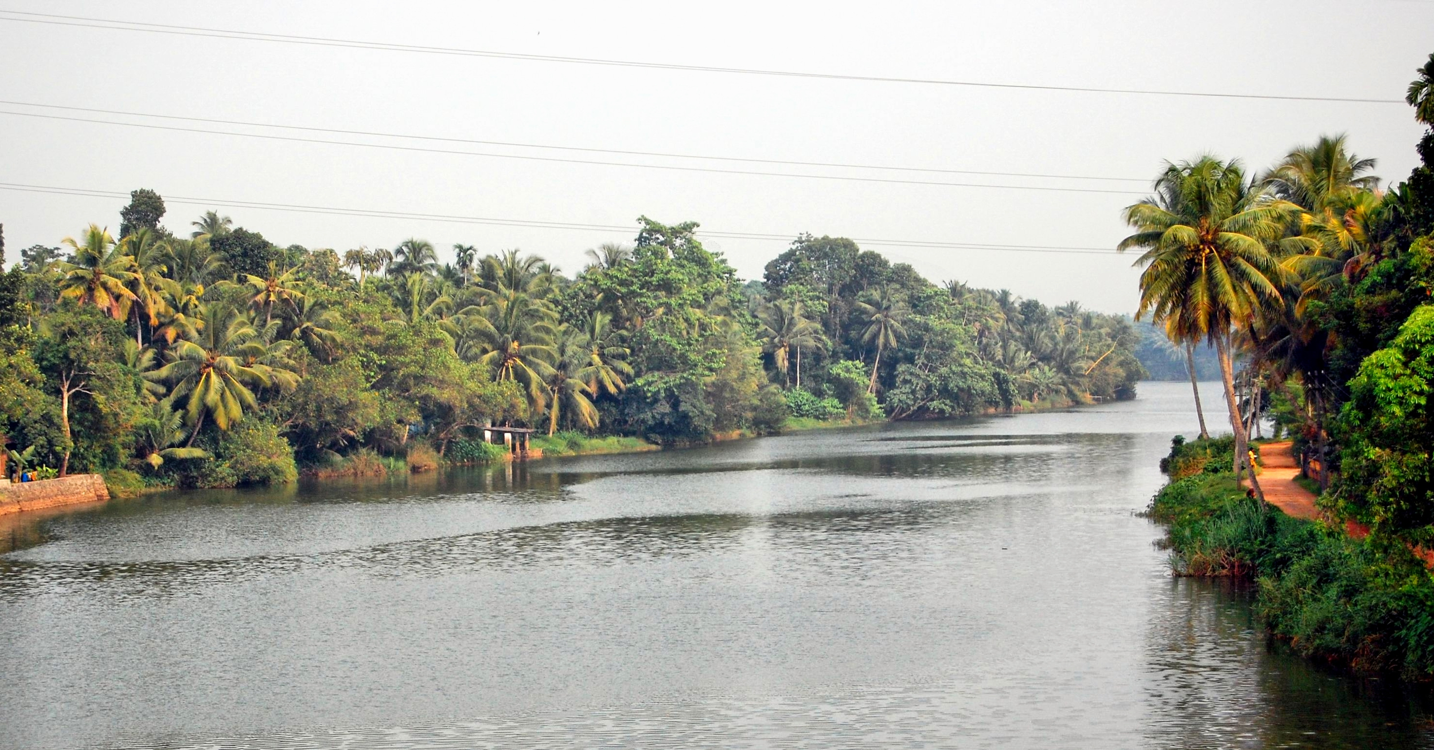 അച്ചൻ കോവിലാർ